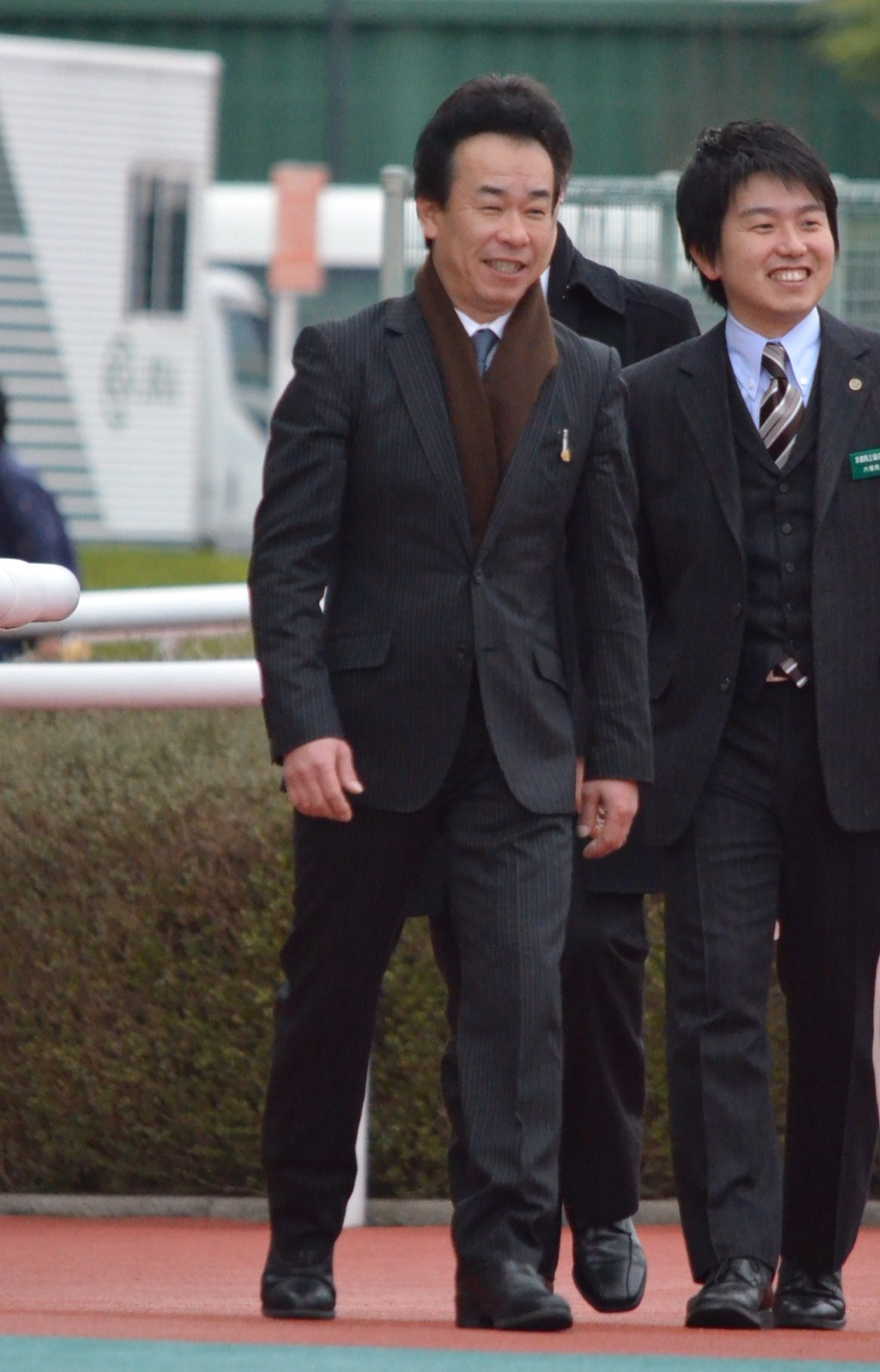 2012年3月10日＠ウィナーズサークルにて。